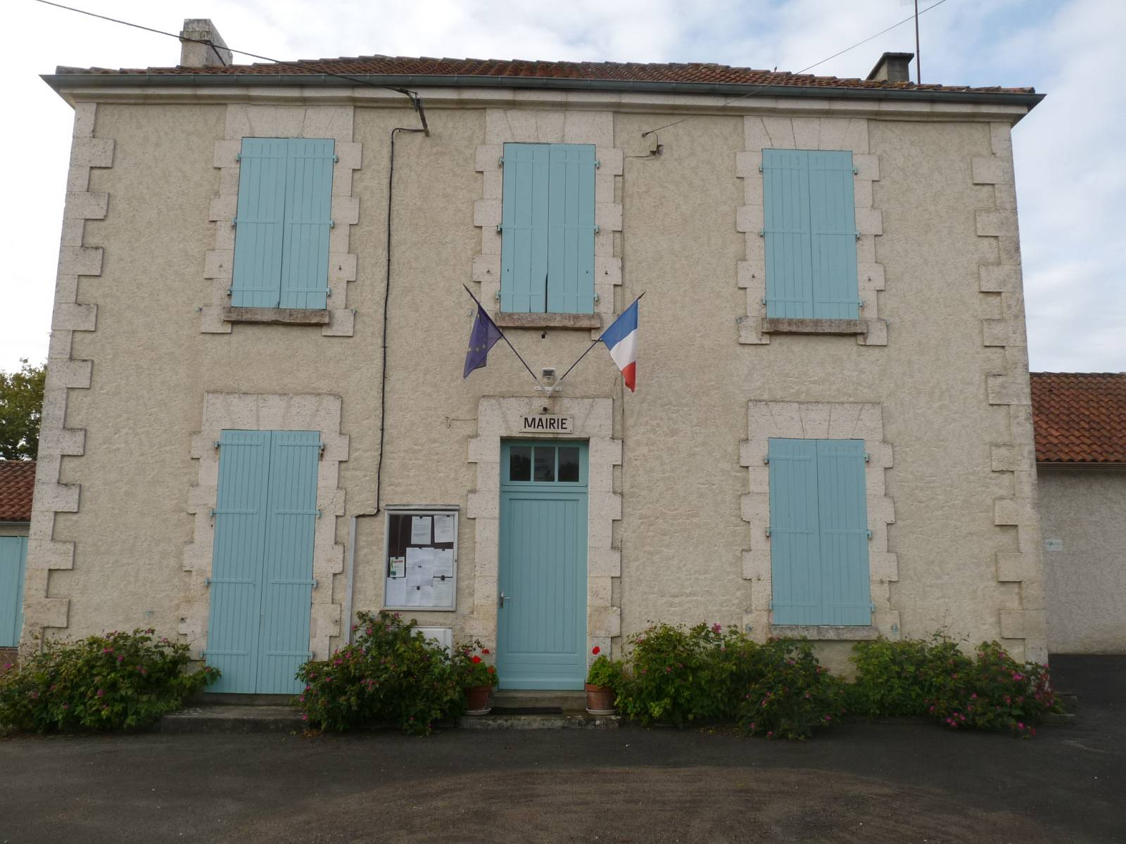 mairie de Turgon, Charente, France